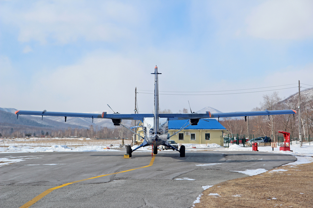 Аэродром Дальнегорска и DHC-6